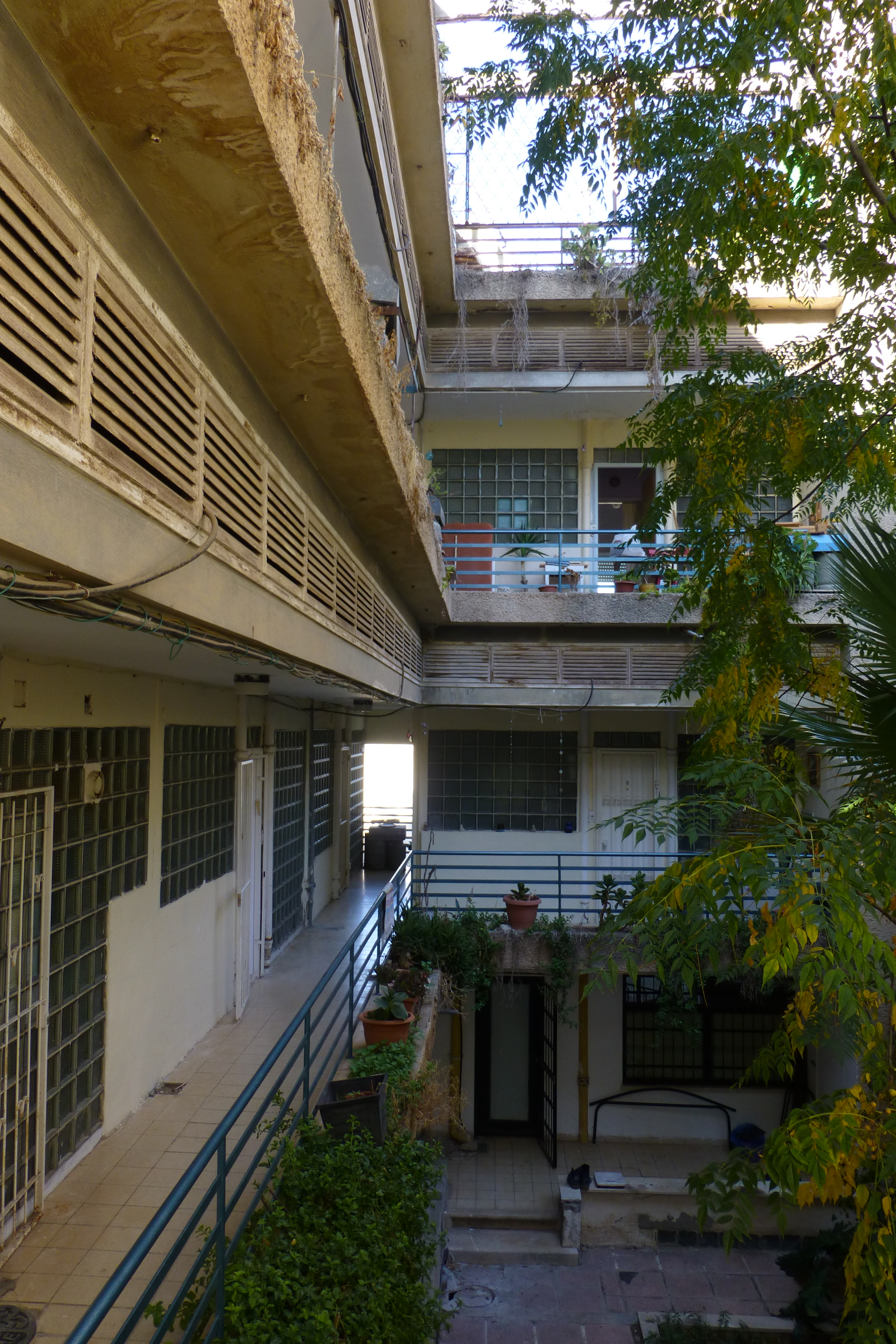 בית הזכוכית בחיפה